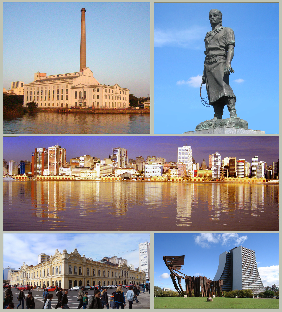 Montagem de fotos da cidade de Porto Alegre, Brasil. De cima para baixo: Usina do Gasômetro, Estátua do Laçador, Cais Mauá, Mercado Público e Monumento aos Açorianos diante do prédio do Centro Administrativo do Estado